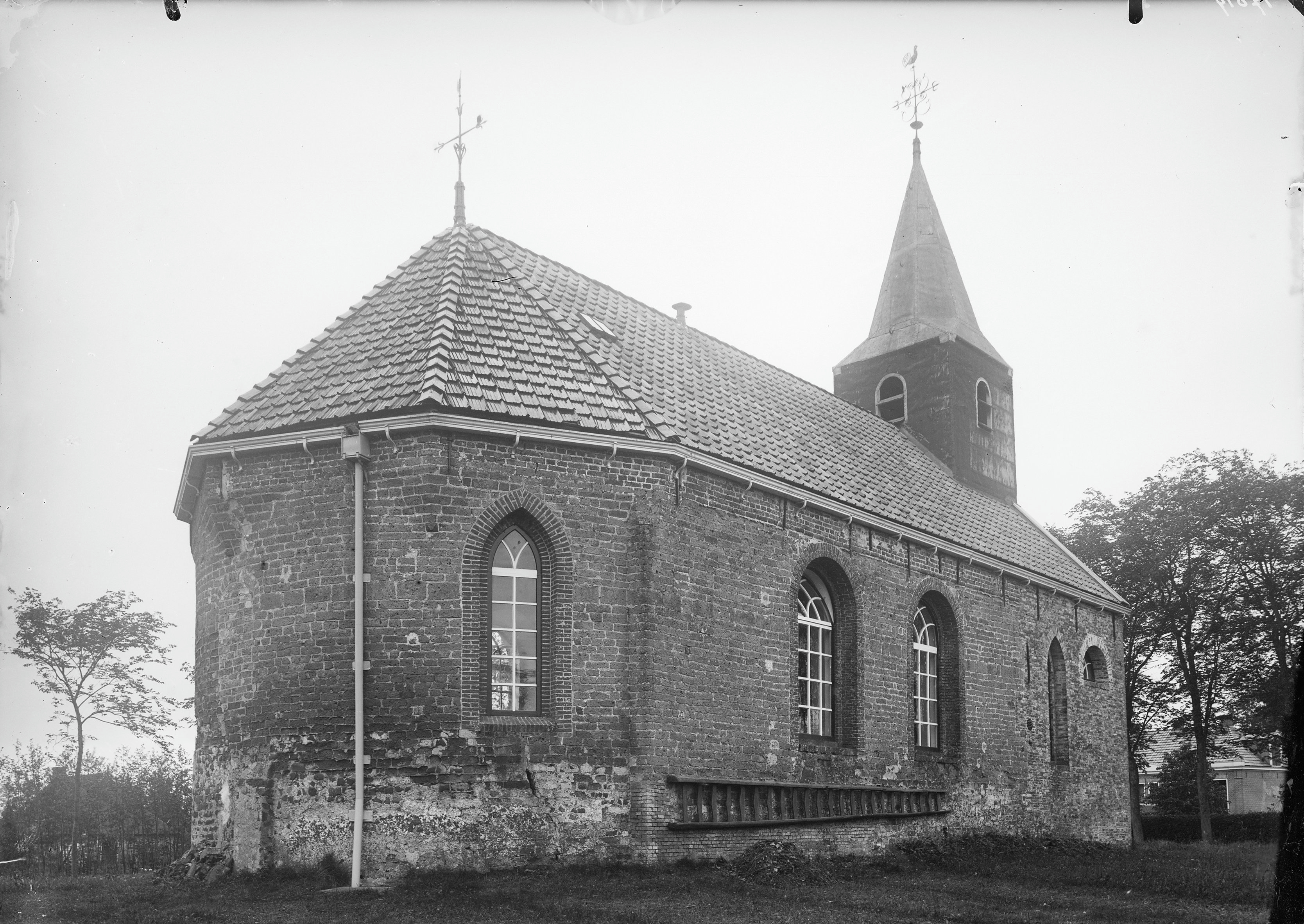 Nederlands Hervormde Kerk: kerk vanuit het noord-oosten